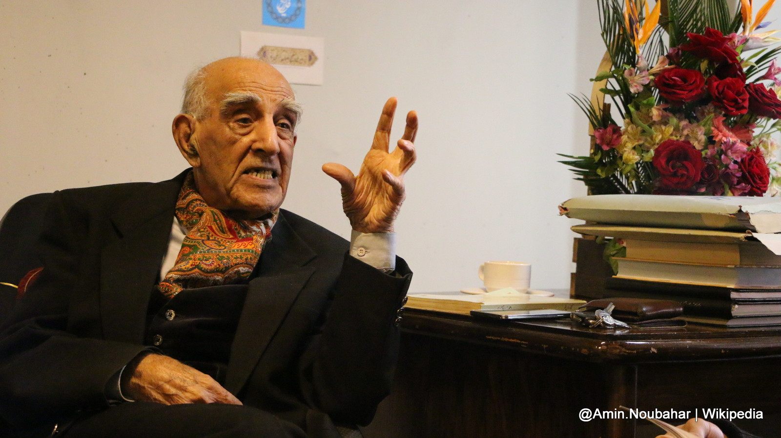 این عکس‌ها در مرکز دایره‌المعارف فارسی در ۱۳۹۵ گرفته شده است.